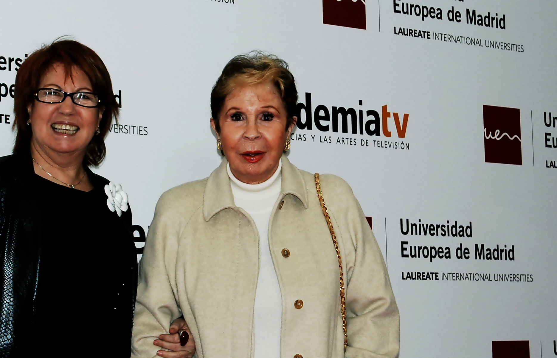 La periodista Rosa Villacastín junto con la actriz Lina Morgan.